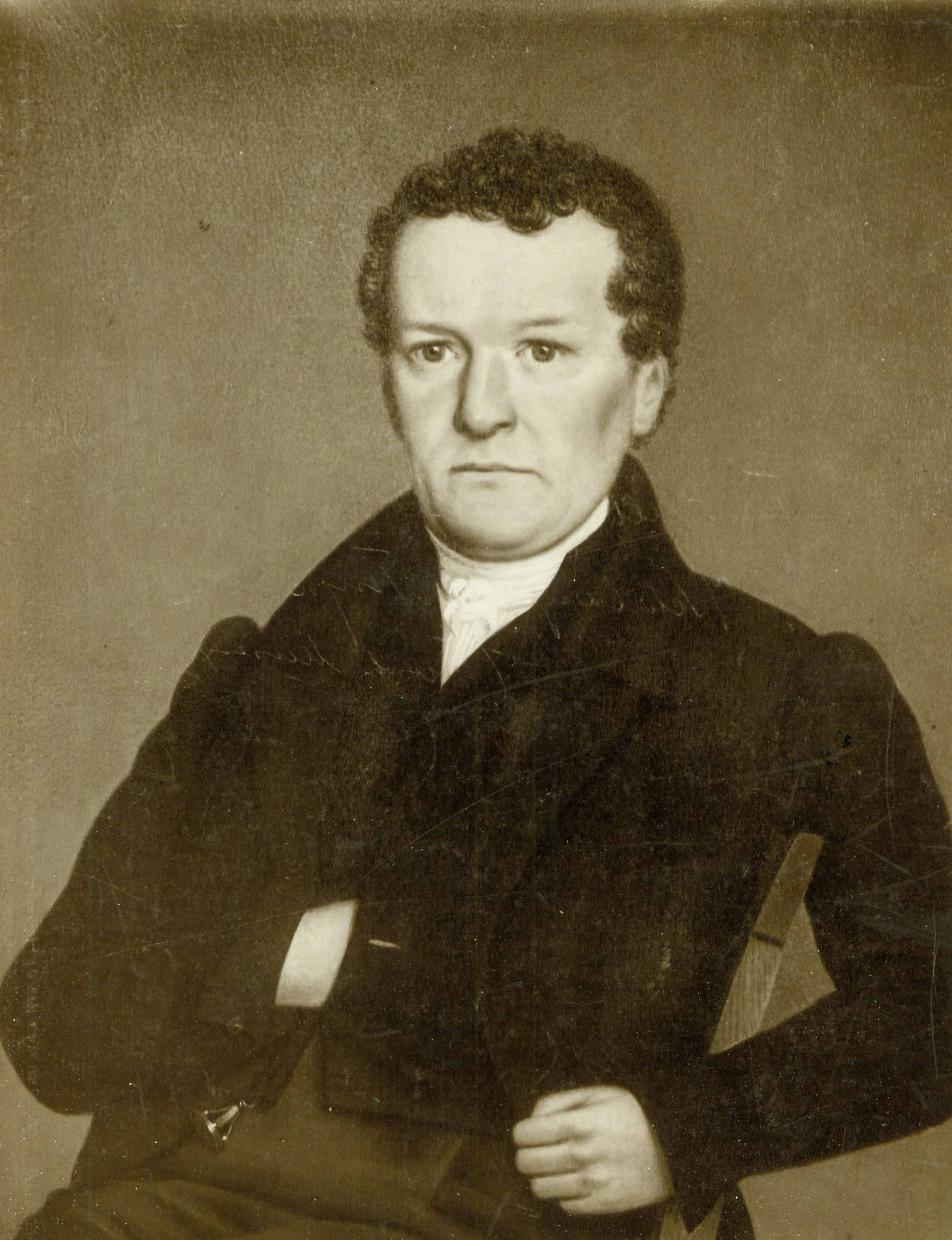 Tsjalling Hiddes Halbertsma (1792-1852)